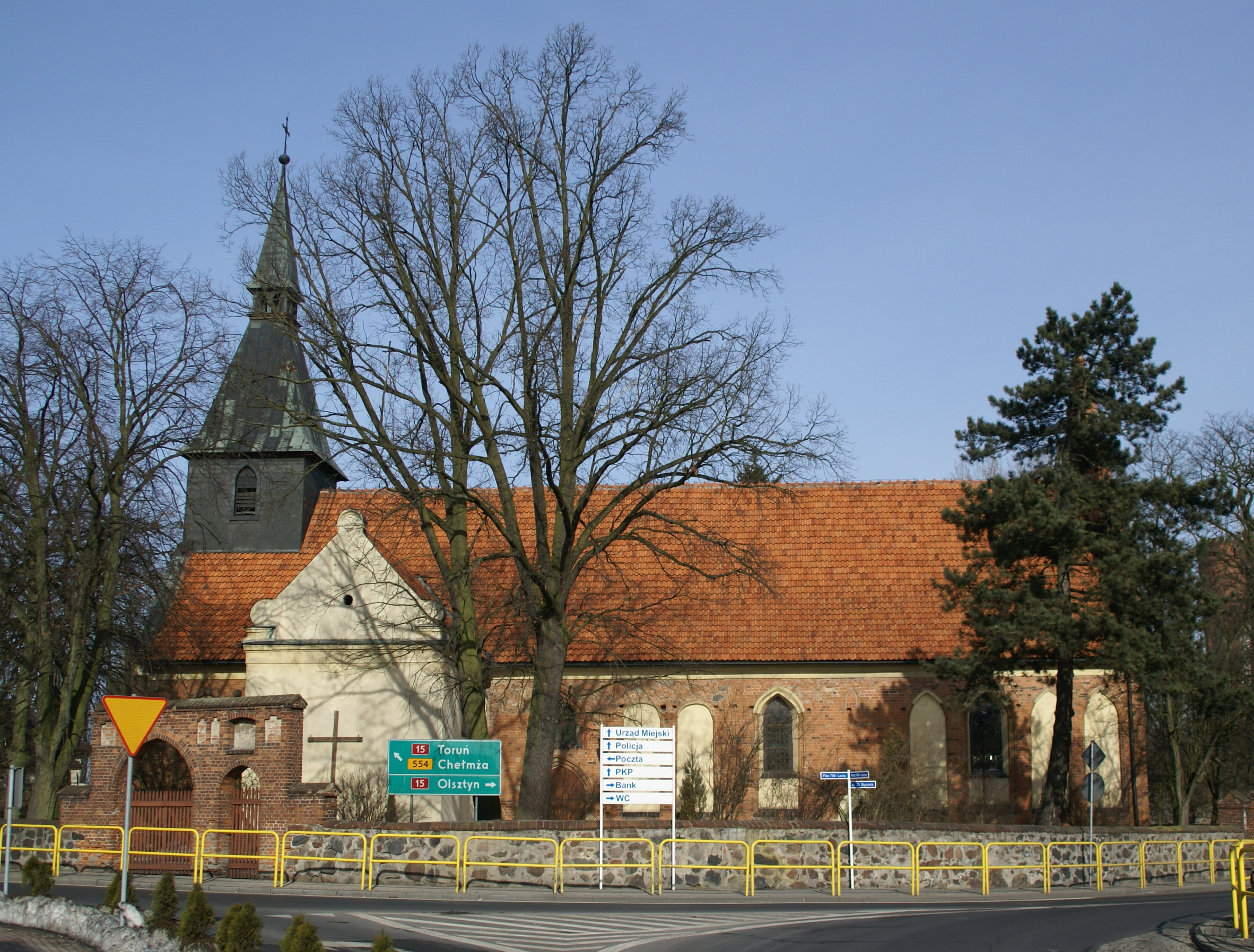 Kowalewo Pomorskie, pl. 700-lecia 24 - rzymskokatolicki kościół parafialny pw. św. Mikołaja, XIV, XV, XVIII)